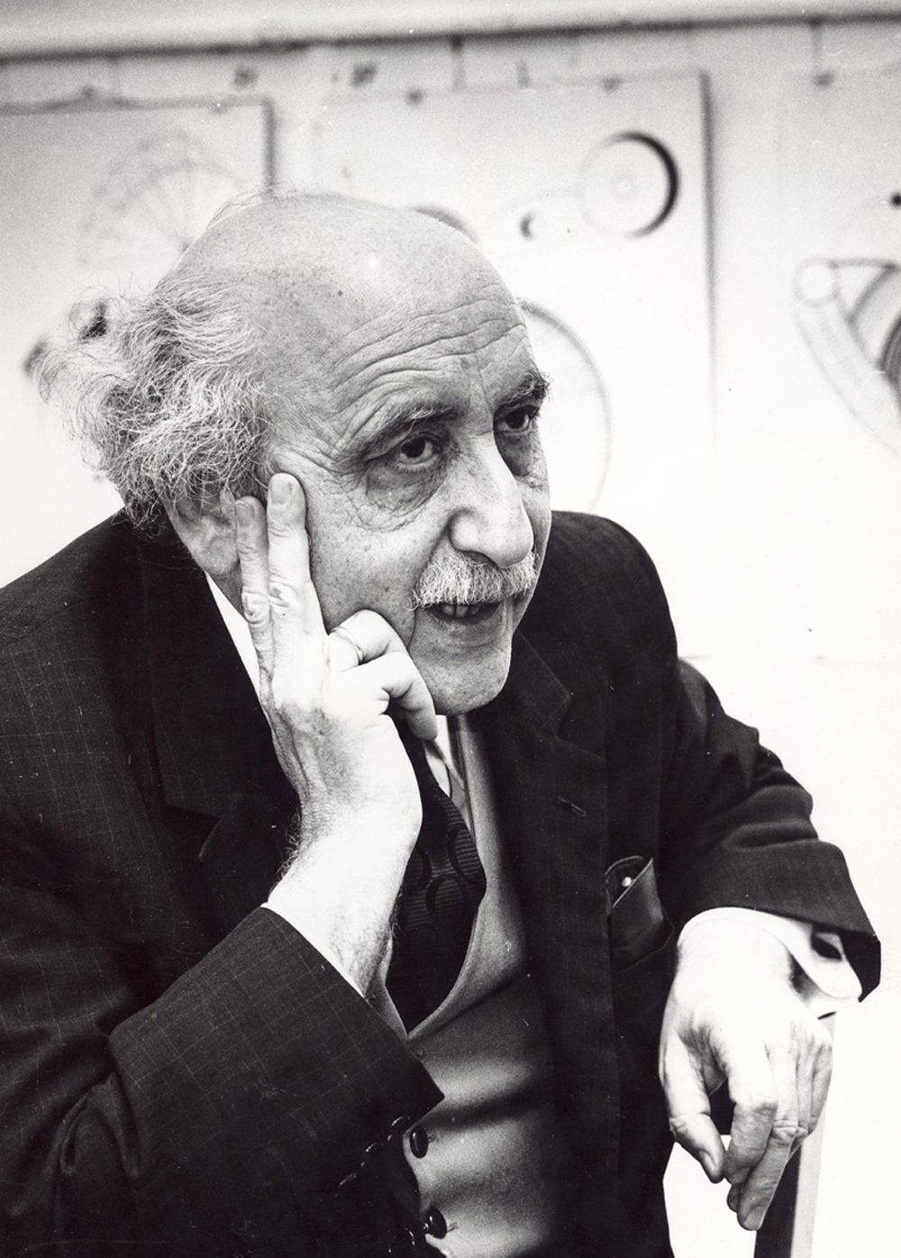 Schalom Ben-Chorin (eigtl. Fritz Rosenthal), Journalist und Religionswissenschaftler, 1975 in München.